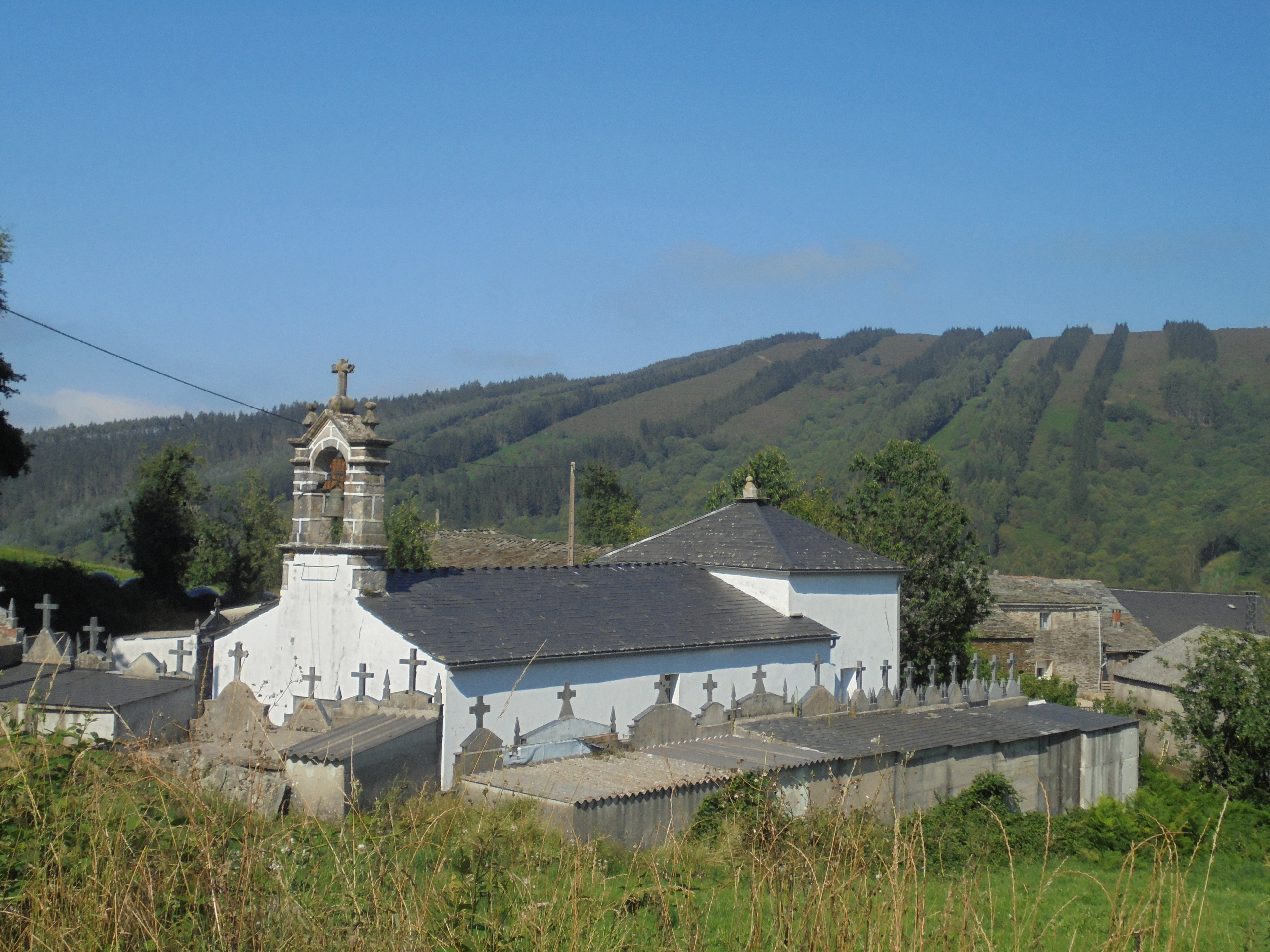 Igrexa parroquial de Retizós ( Baleira)